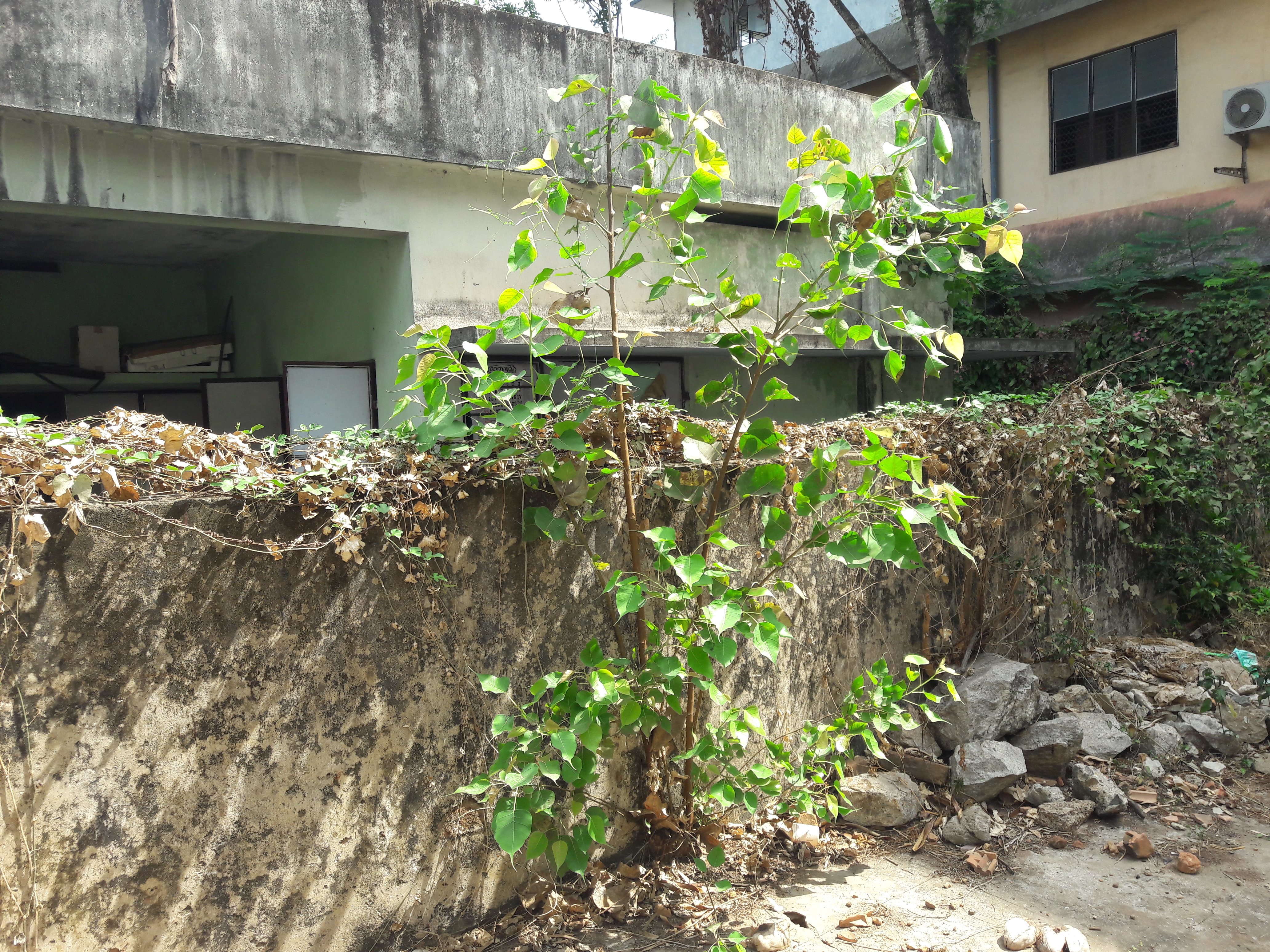 ഗവ. മോഡൽ ബോയ്സ് എച്ച്.എസ്.എസ്, തൈക്കാട് മതില്‍ പറ്റി പ്രതികൂല സാഹചര്യങ്ങളില്‍ വളരുന്ന ഒരു അരയാല്‍ peepal tree. ശാസ്ത്രീയ നാമം Ficus religiosa കുടുംബം Moraceae.